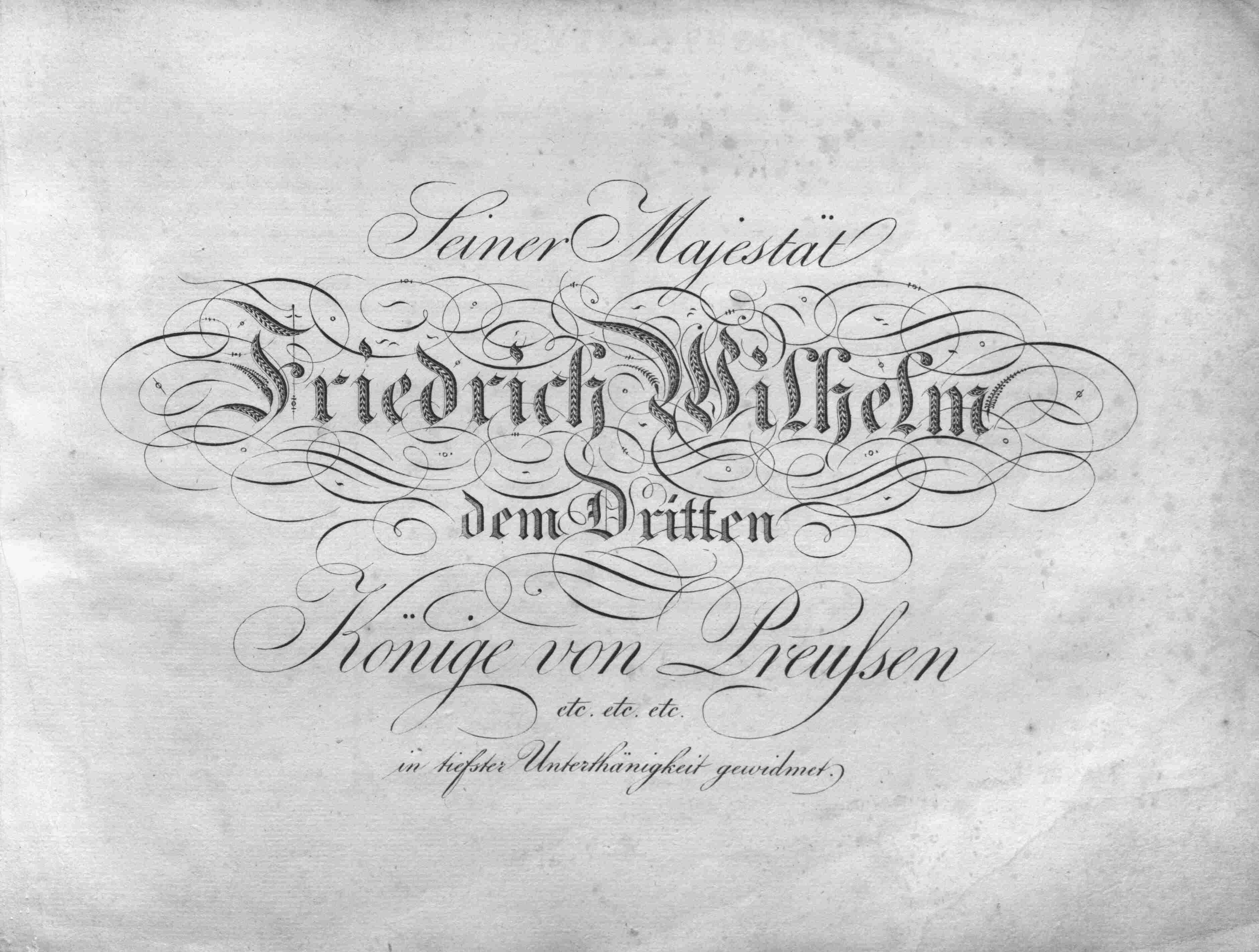 Widmungsseite der Erstausgabe der Partitur zum Oratorium "Das Weltgericht" von Friedrich Schneider